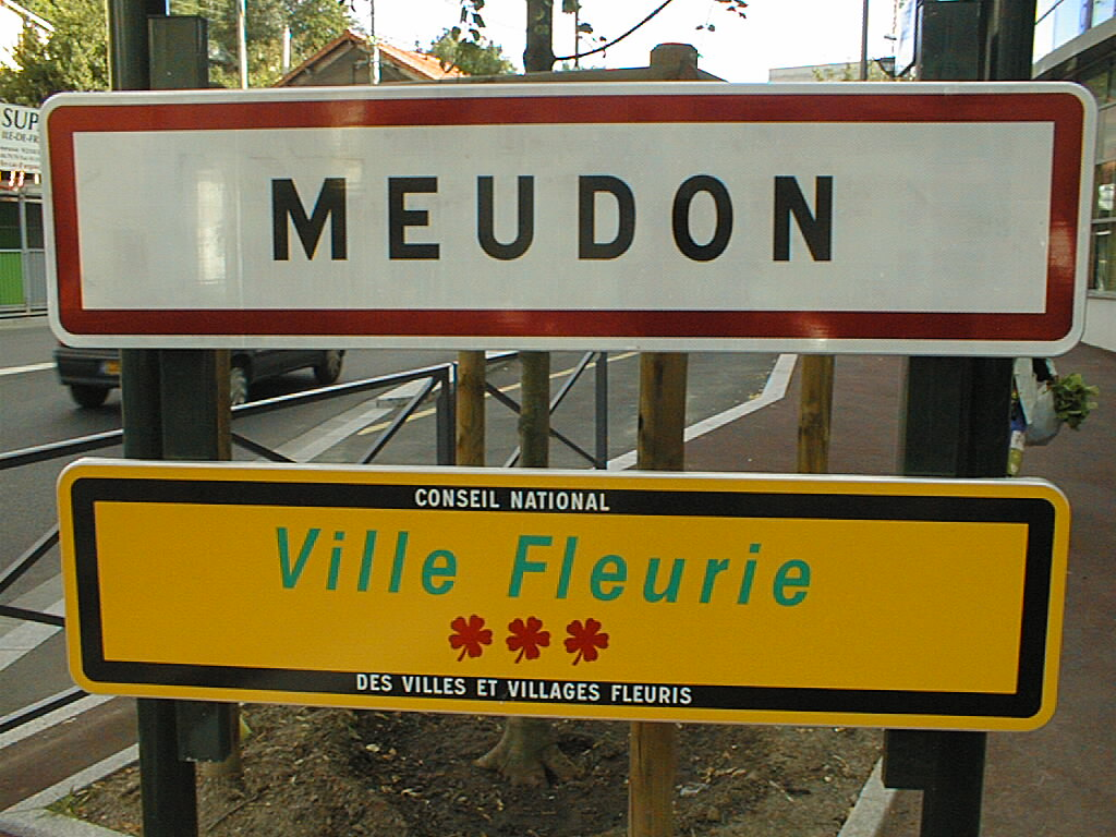 description : panneau de signalisation de la ville de Meudon Auteur : Benoît92 date: 20 juillet 2005